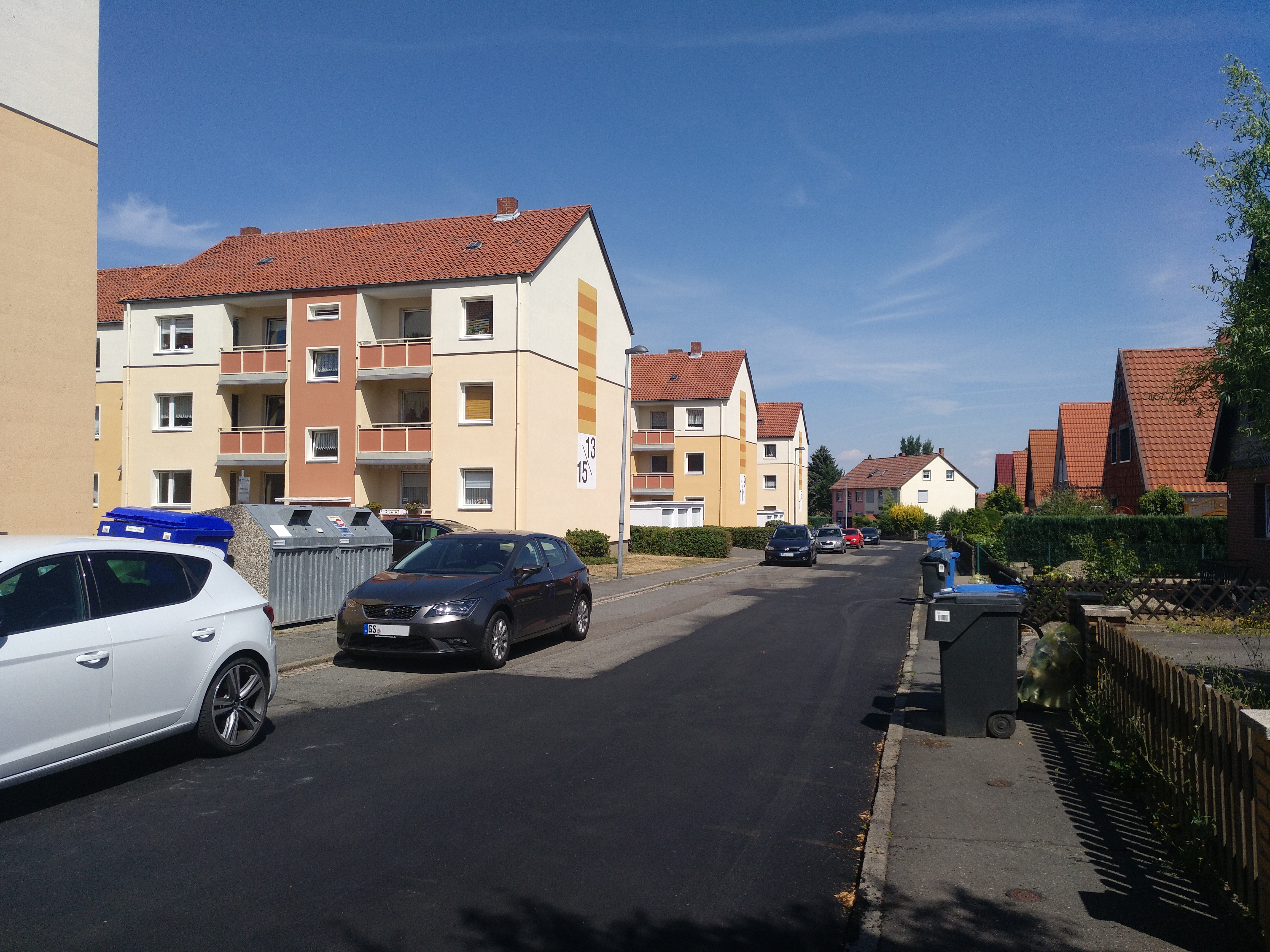 Ab 1960 errichtete Gebäude an der Raabestraße im Rahmen des Bauprojekts Harlingerode Ost